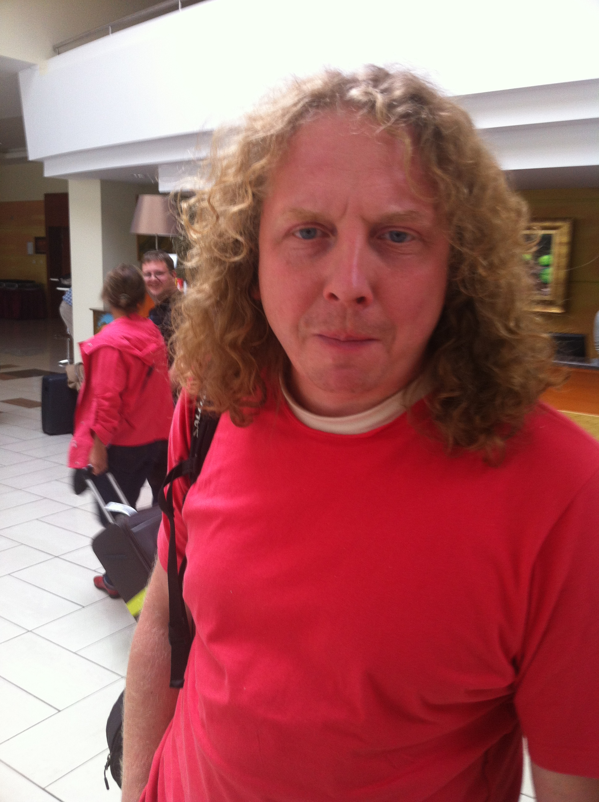 Madis Arukask 2012. aastal VI soome-ugri rahvaste maailmakongressil Siófokis.